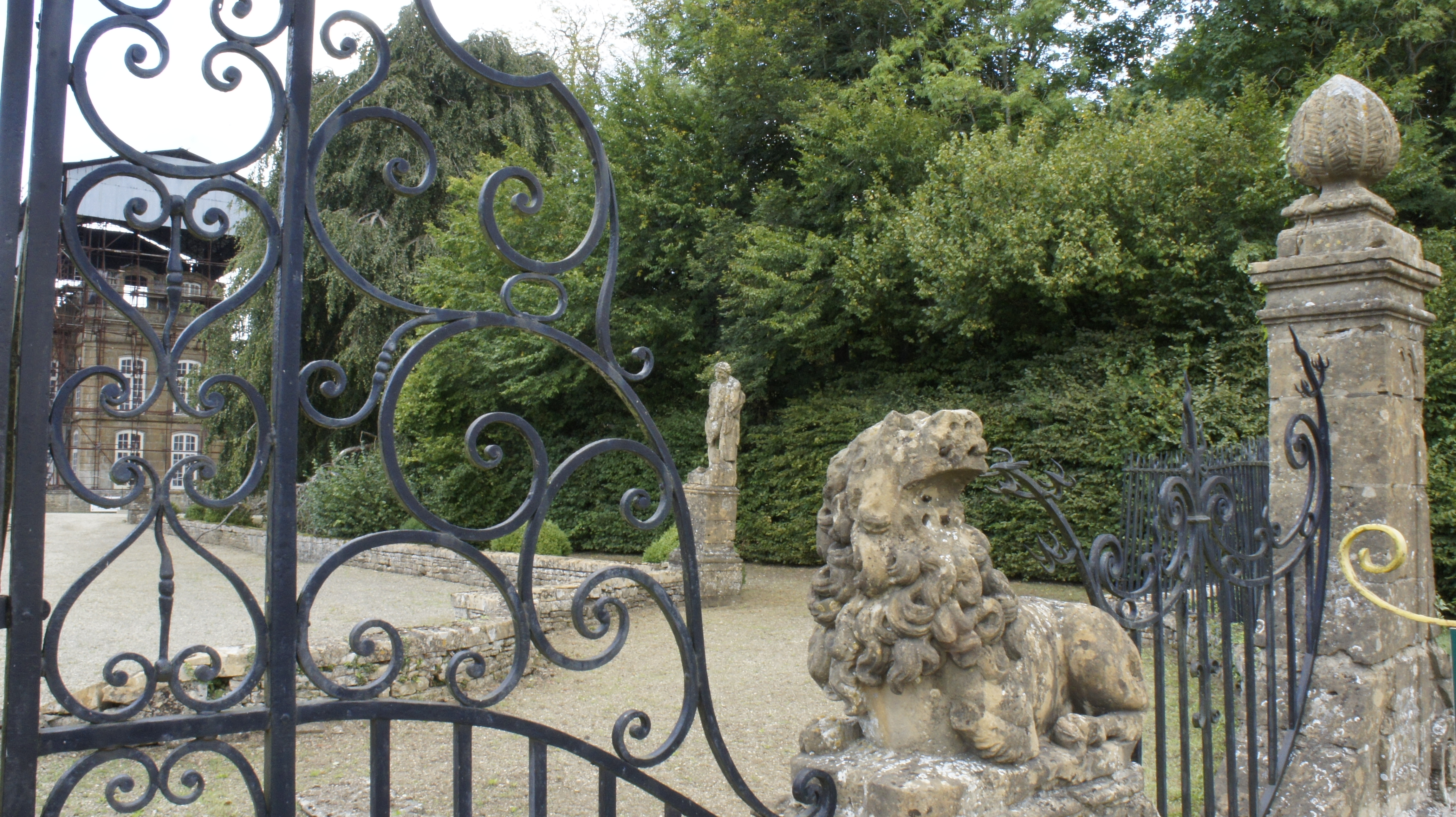 Pigonnier du parc du château.